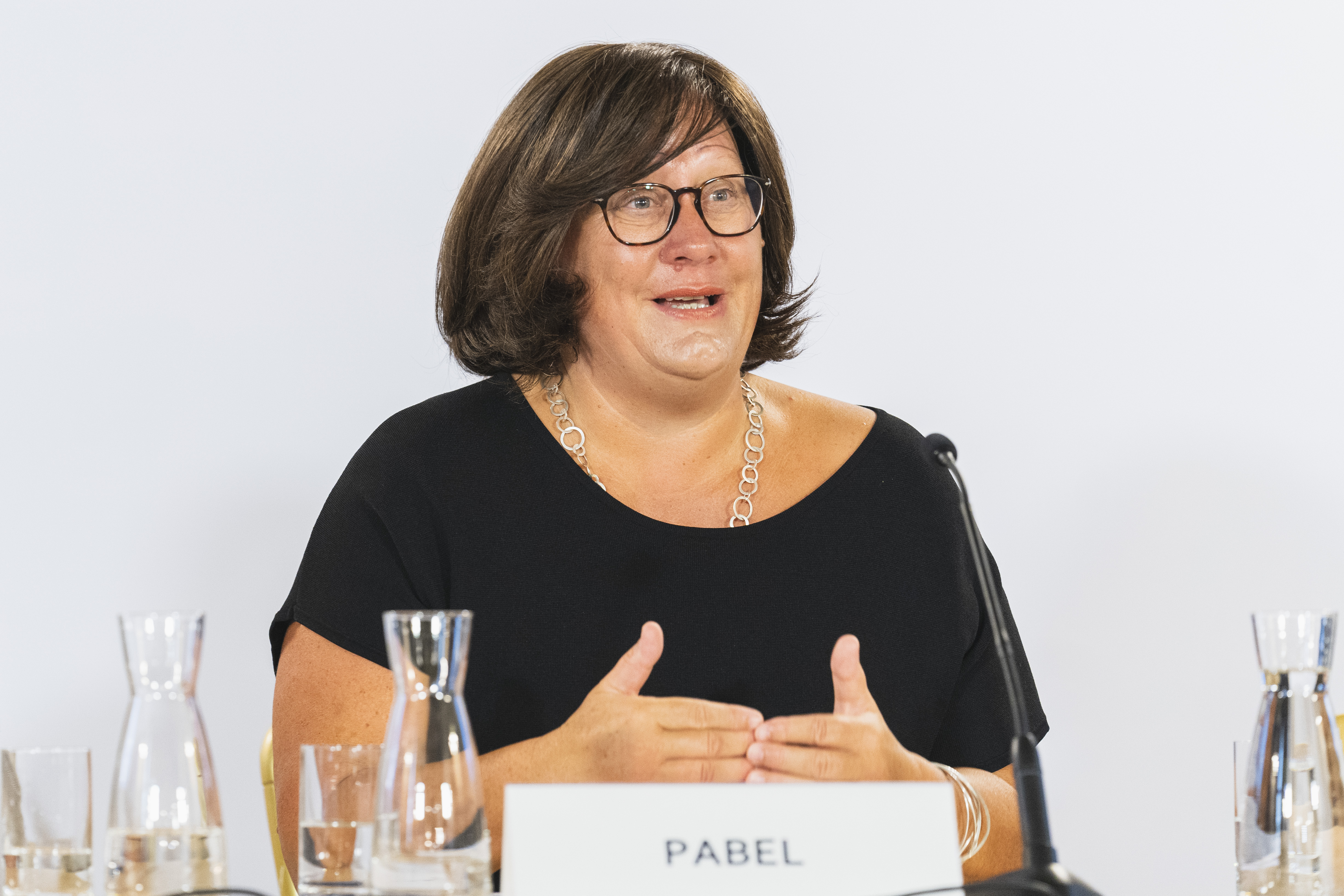 Katharina Pabel (Vorsitzende d. Expertenrats für Integration) bei der Präsentation vom Integrationsbericht 2019, Wien, 4. September 2019 Copyright: BMEIA/ Eugénie Berger